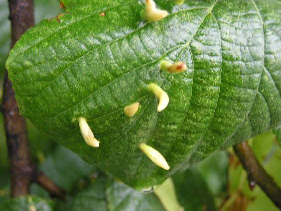 Gallen von Eriophyes tiliae auf einer Linde Tilia. In der Nähe von Bonn (Deutschland).